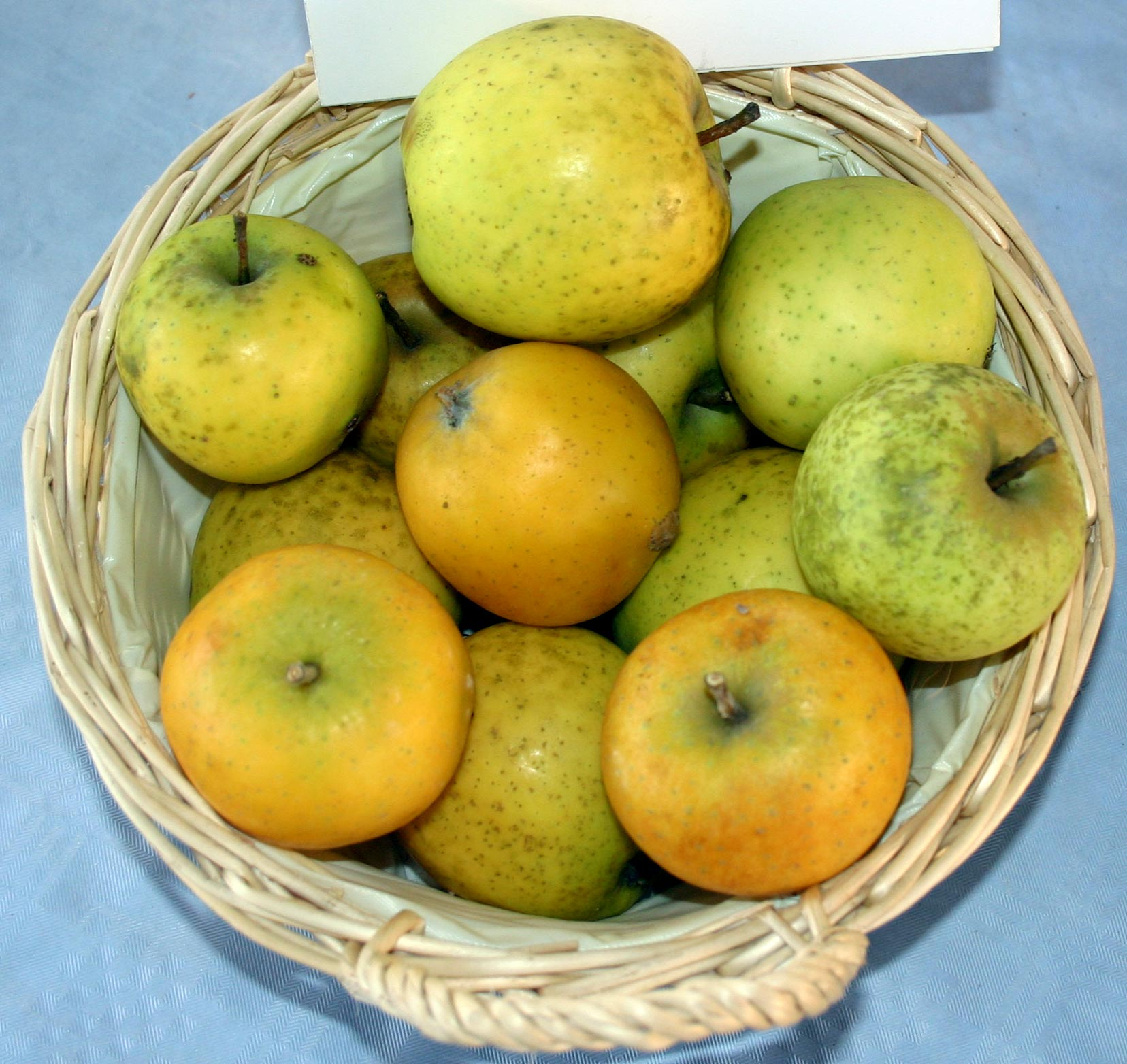 Die Ananasrenette ist eine Sorte des Kulturapfels (Malus domestica). Sie zählt zu den alten Obstsorten. Sie stammt aus den Benelux-Ländern und wird seit 1820 im Rheinland angebaut. Die Früchte der Ananasrenette mit ihrem besonderen, sortentypischen Aroma (saftig und aromatisch) bleiben eher klein. Sie entwickeln in warmer Umgebung einen intensiven Ananasduft.